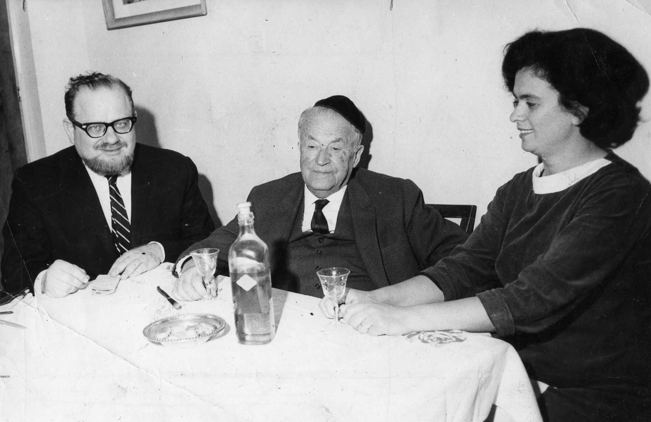 'הסופר ש"י עגנון עם הרב פרופ' פינחס פלאי הכהן ופנינה פלאי, בביתם